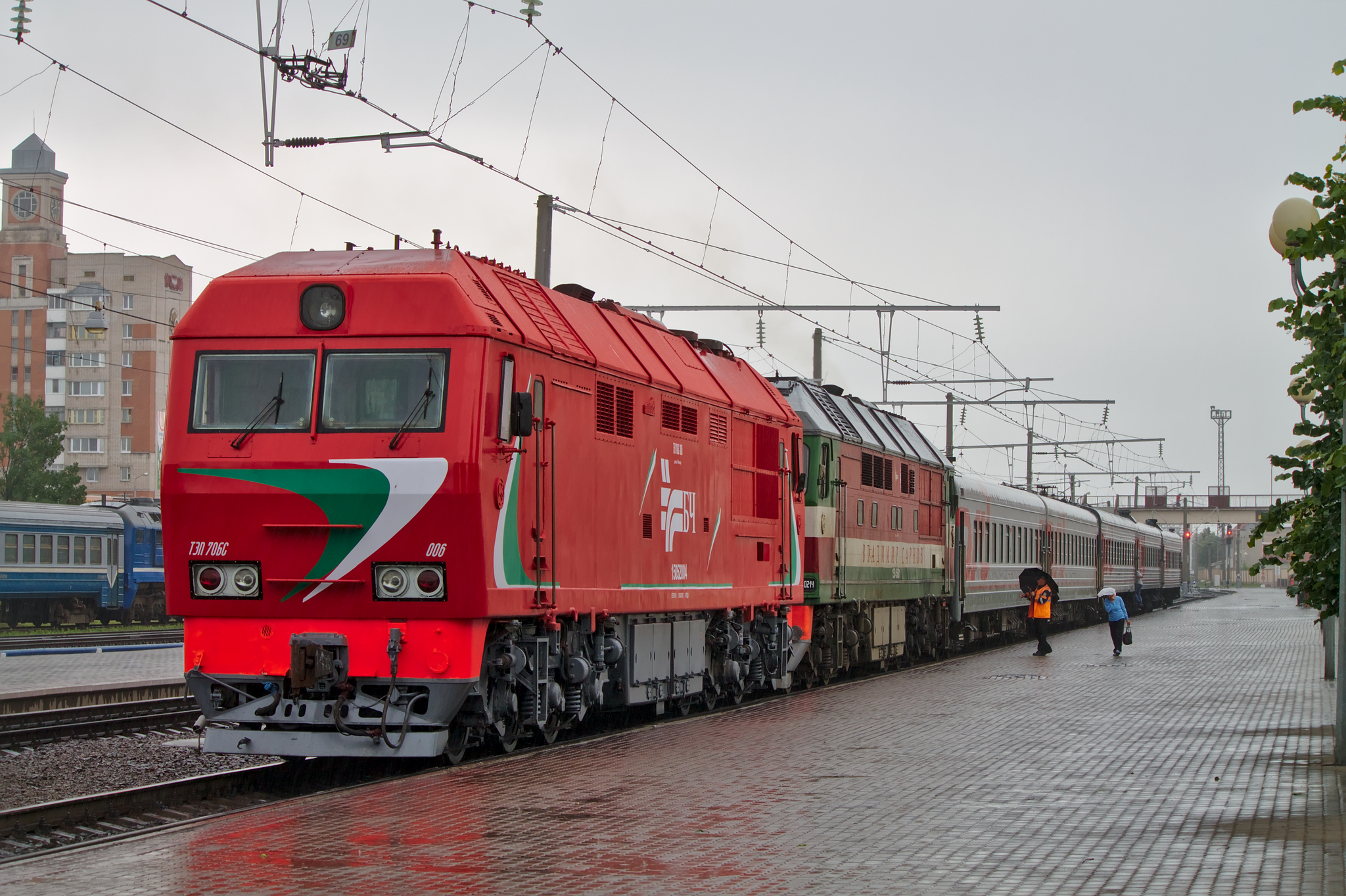 ТЭП70БС-006 и ТЭП70-0214 «Владимир Сарнов» с поездом Одесса - Санкт-Петербург. см. фото 601679 в альбоме автора